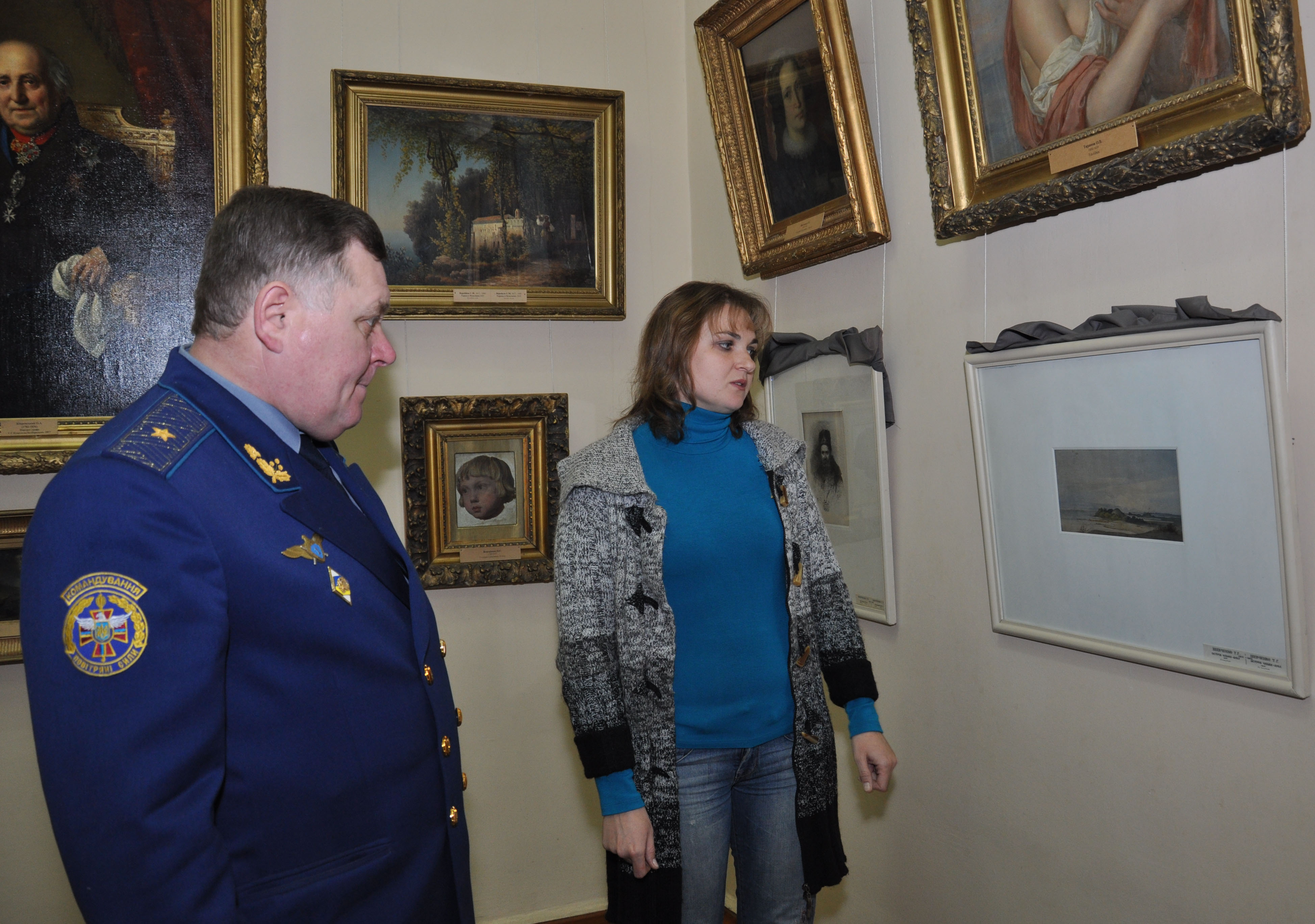 Kharkov Art Museum